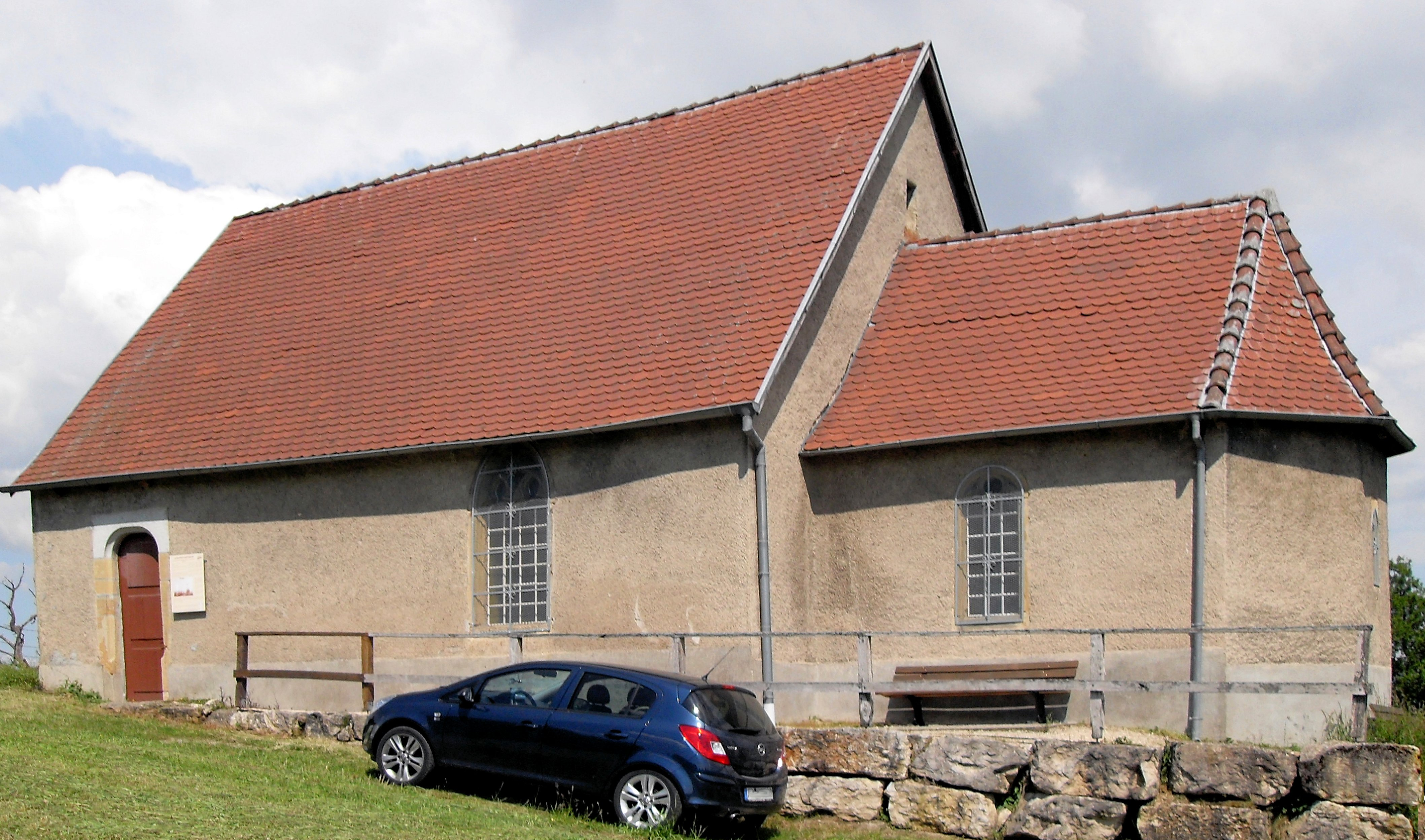 La chapelle Saint-Martin à Ballersdorf La chapelle actuelle serait le dernier vestige d'un village disparu: Mettersdorf voisin de Ballersdorf. Les deux villages ont étê décinés et détruits à plusieurs reprises durant la Guerre de Cents Ans